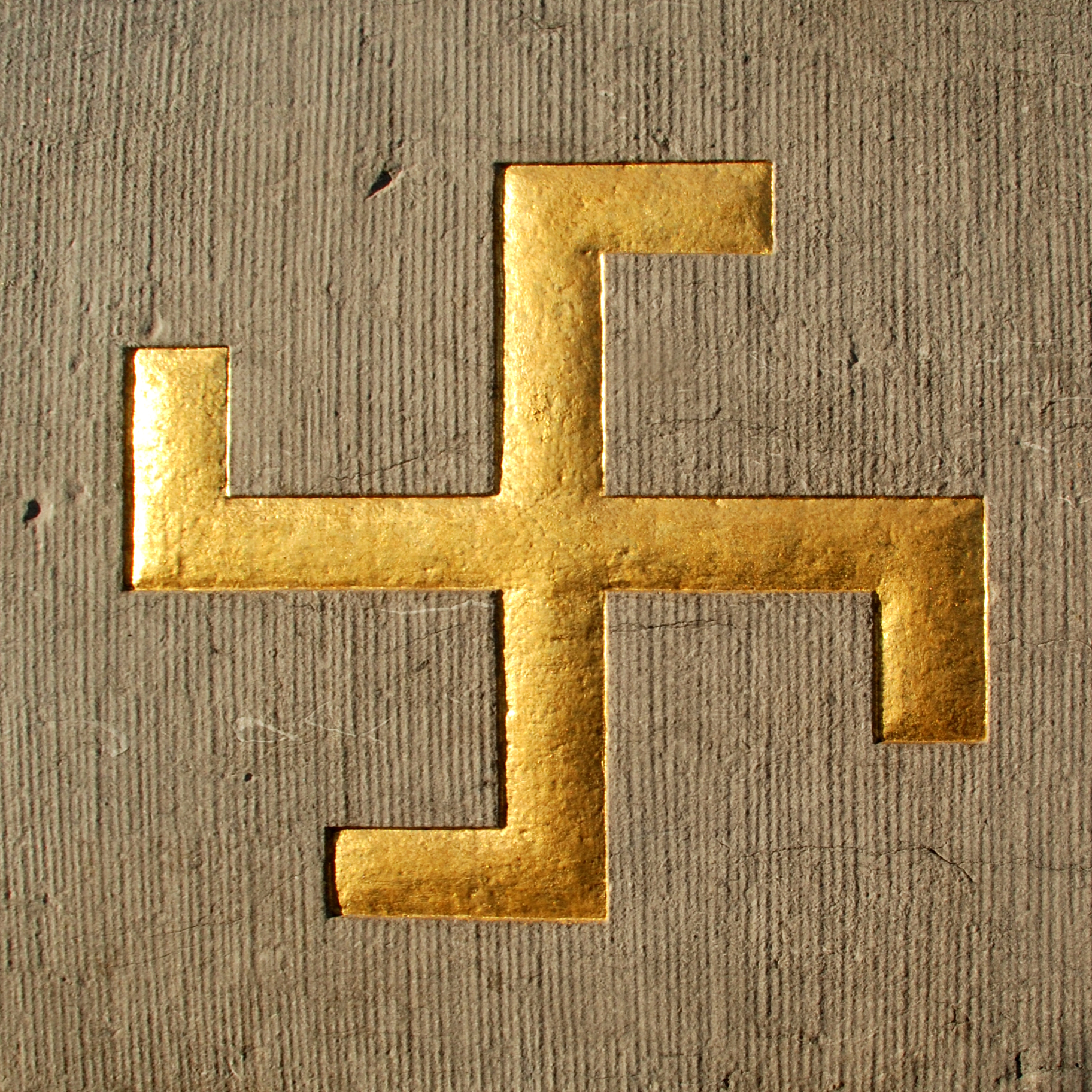 Belgique - Brabant wallon - Court-Saint-Etienne - Mausolée Goblet d'Alviella - symboles ésotériques - svastika